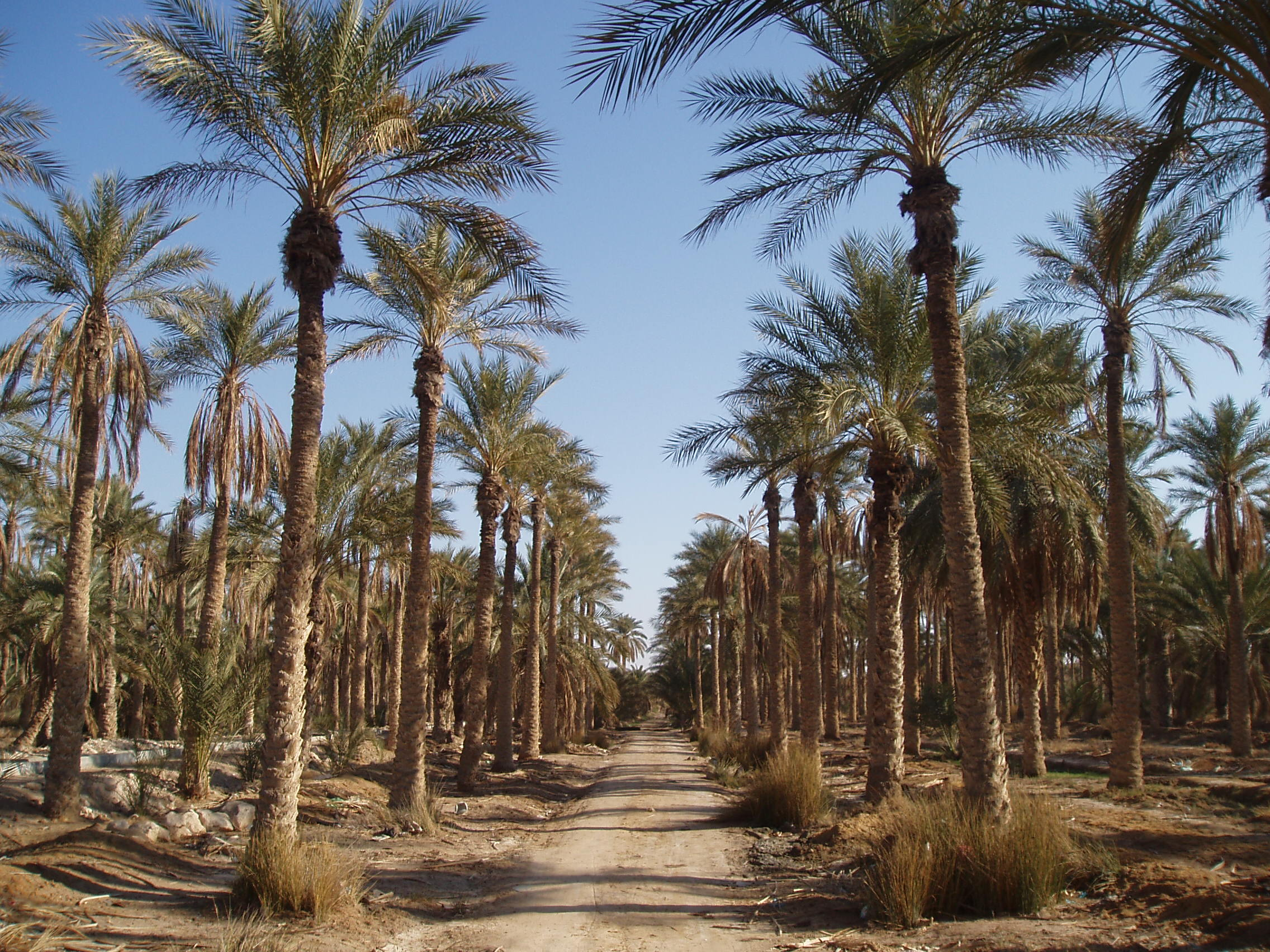 ورقلة تقرت